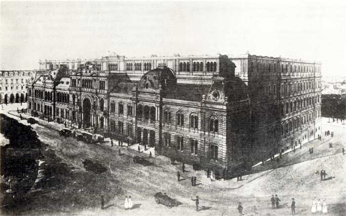 Perspectiva del arquitecto Francesco Tamburini mostrando su proyecto para unificar la Casa de Gobierno en Buenos Aires, y la ampliación del edificio.